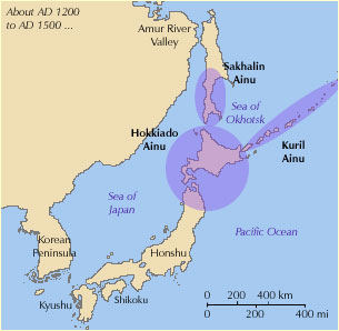 Ainu keele levikuala kaart